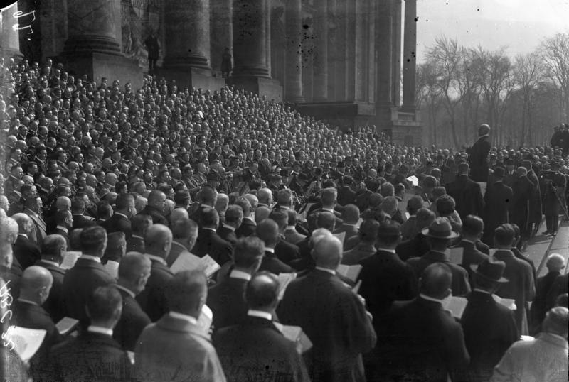 Treue-Kundgebung für die Brüder an der Ruhr fand am 25. März 1923 auf dem Königsplatz statt. 400 Sänger auf der Freitreppe des Reichstages.